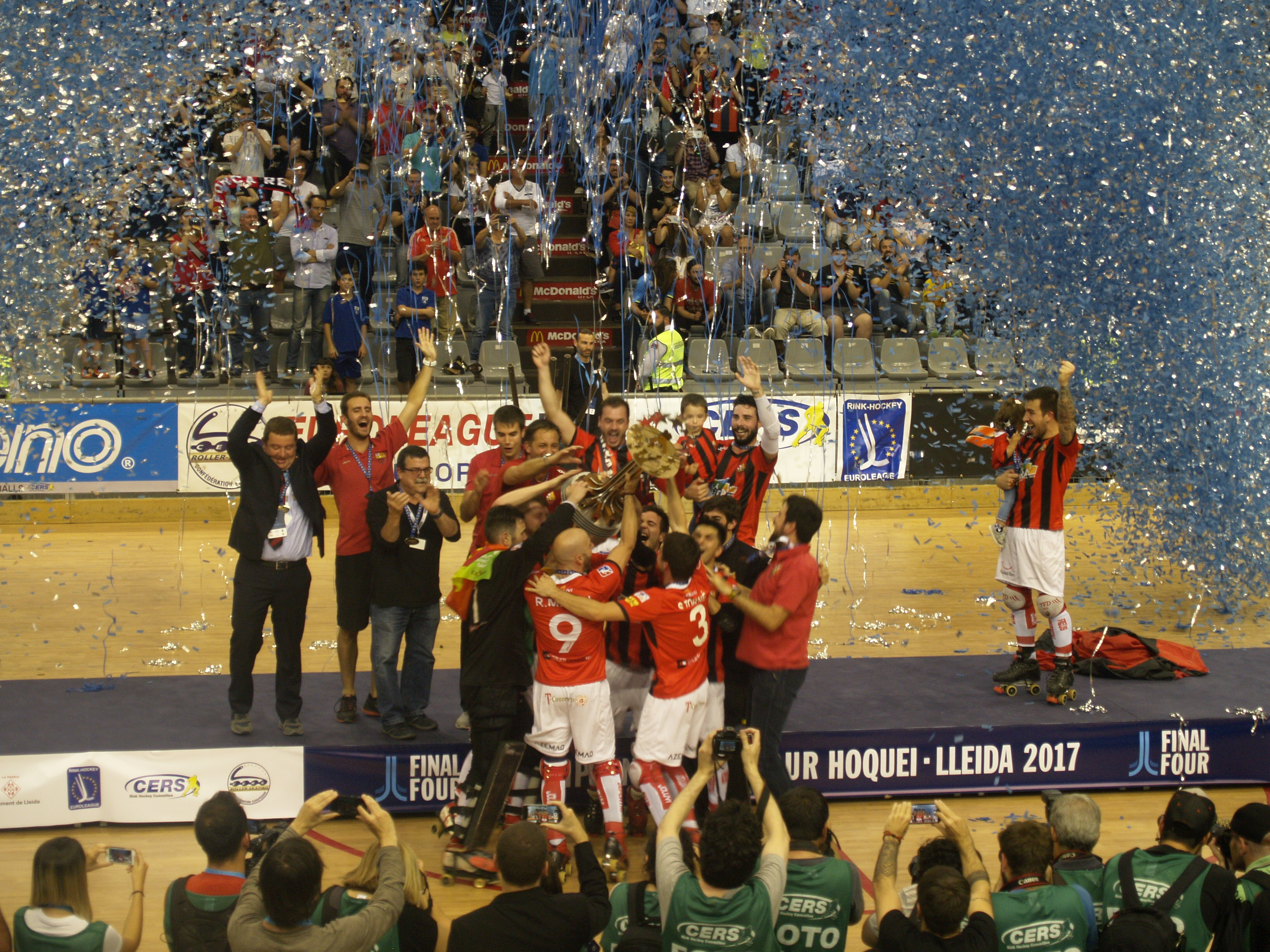 Final de la CERH European League 2016-17 celebrada en Lleida entre el Oliveirense y el Reus.